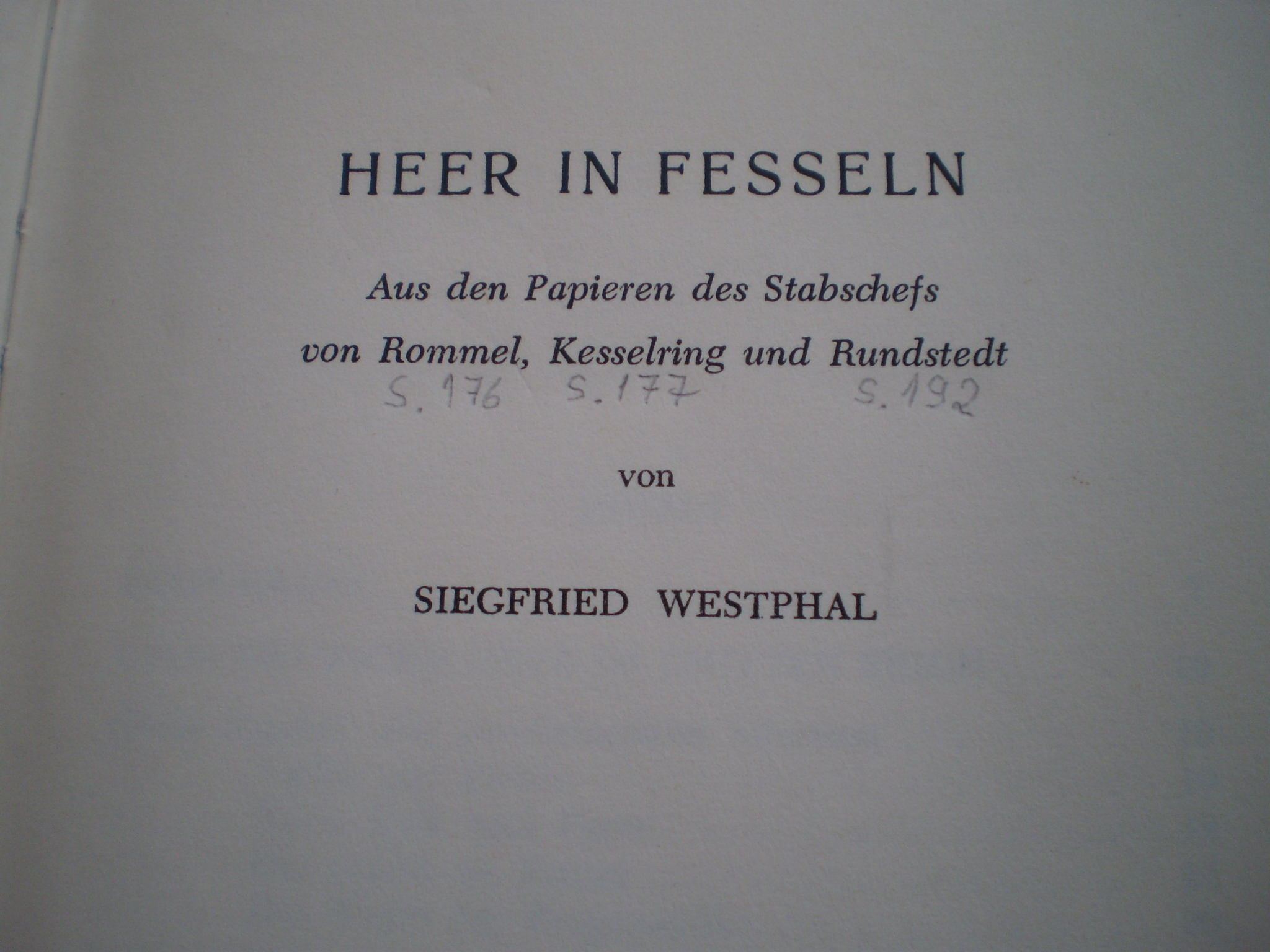 Página de rosto do livro de Siegfried Westphal: Heer in Fesseln